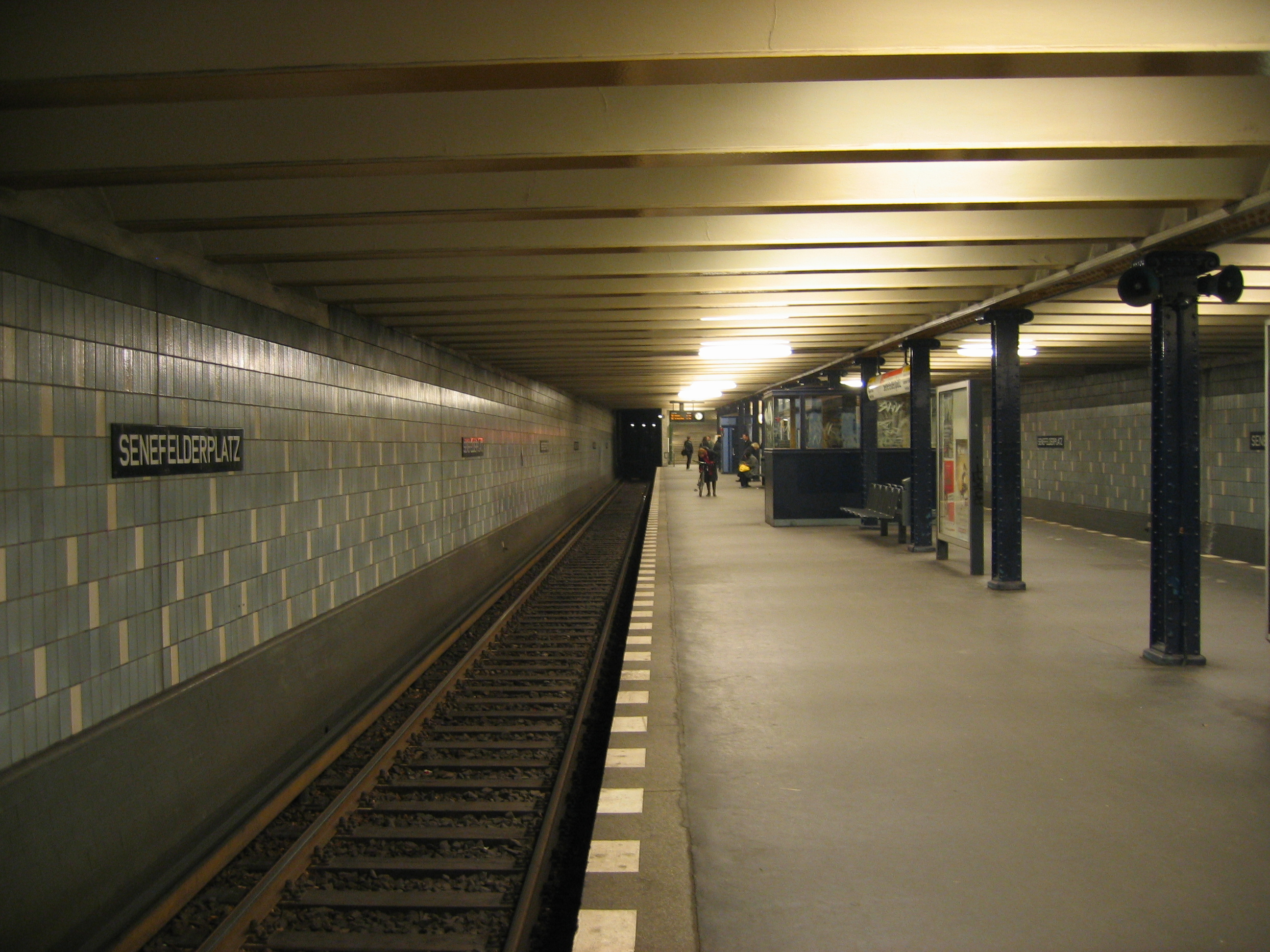 U-Bahnhof Senefelderplatz in Berlin